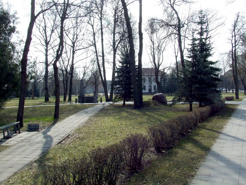 Ramybės skveras Jonavoje.